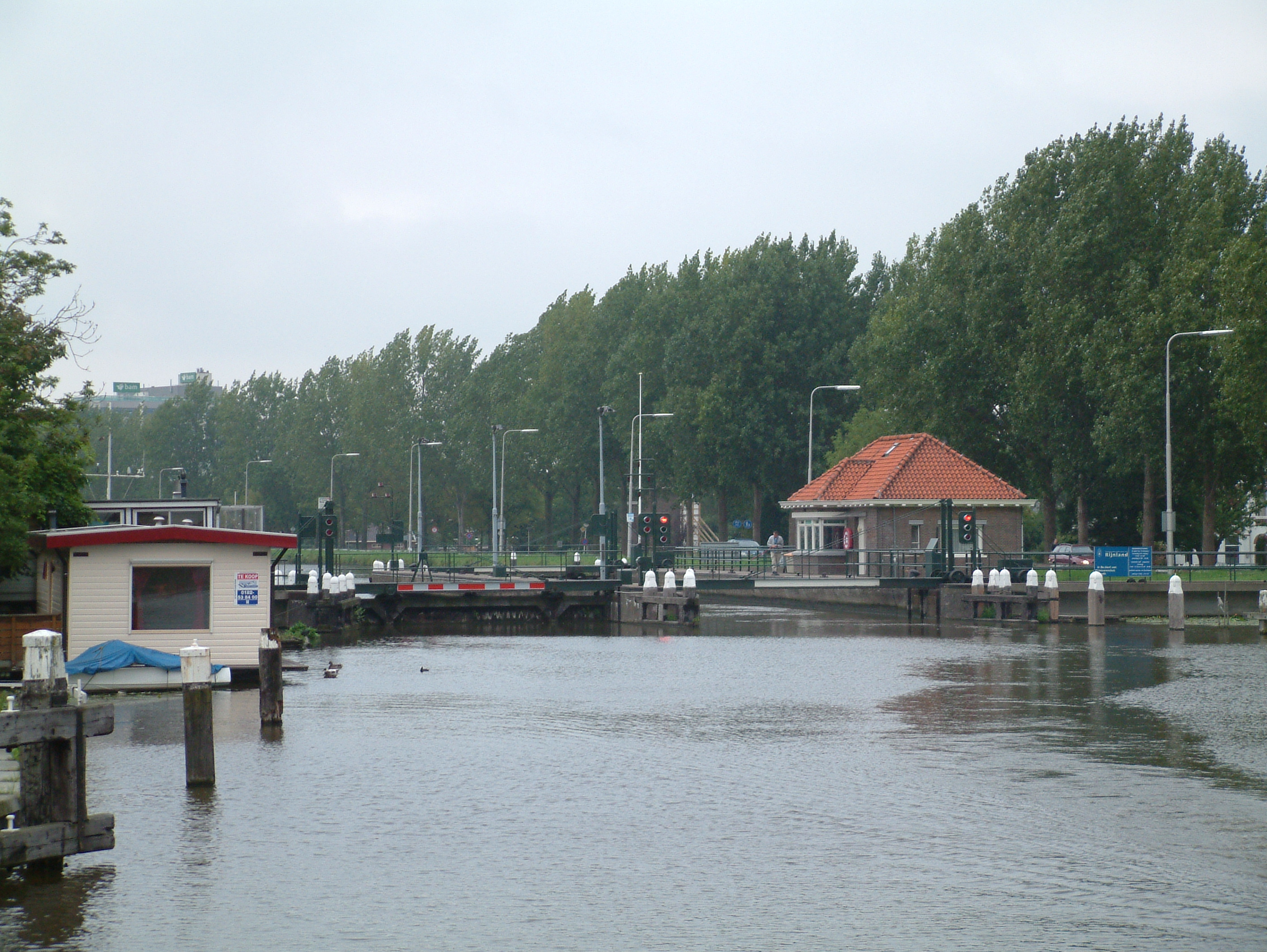 De Ir. De Kock van Leeuwensluis Gouda, schutsluis en keersluis samen